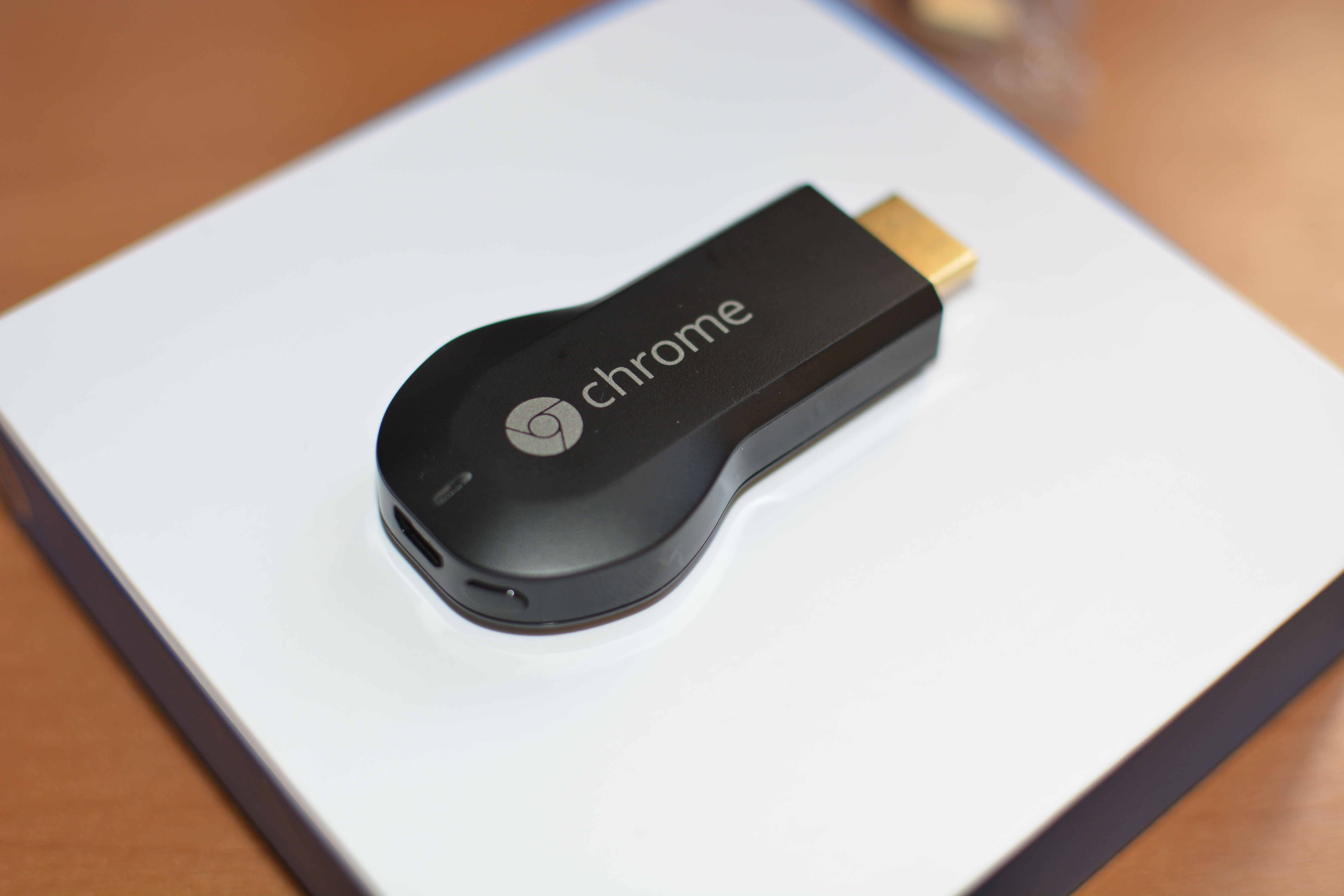 Google Chromecast